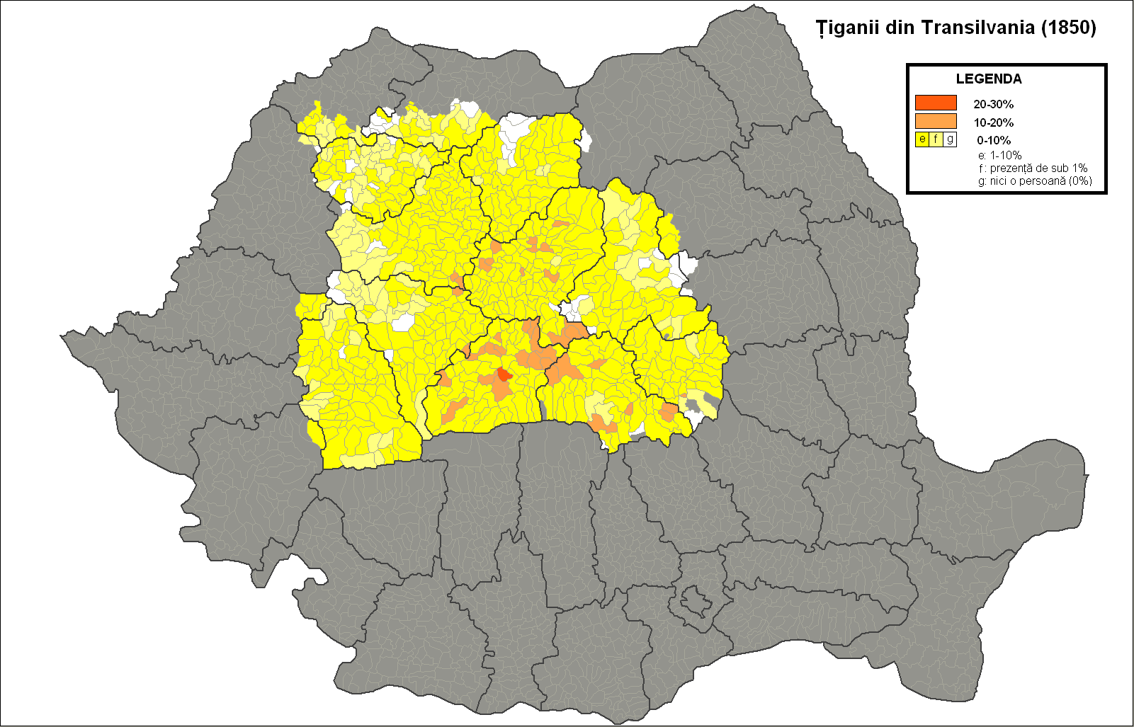 Persoanele declarate drept ţigani la recensământul organizat de autorităţile habsburgice în Transilvania în anul 1850. Harta reprezintă limitele administrative actuale: judeţe, comune, oraşe.